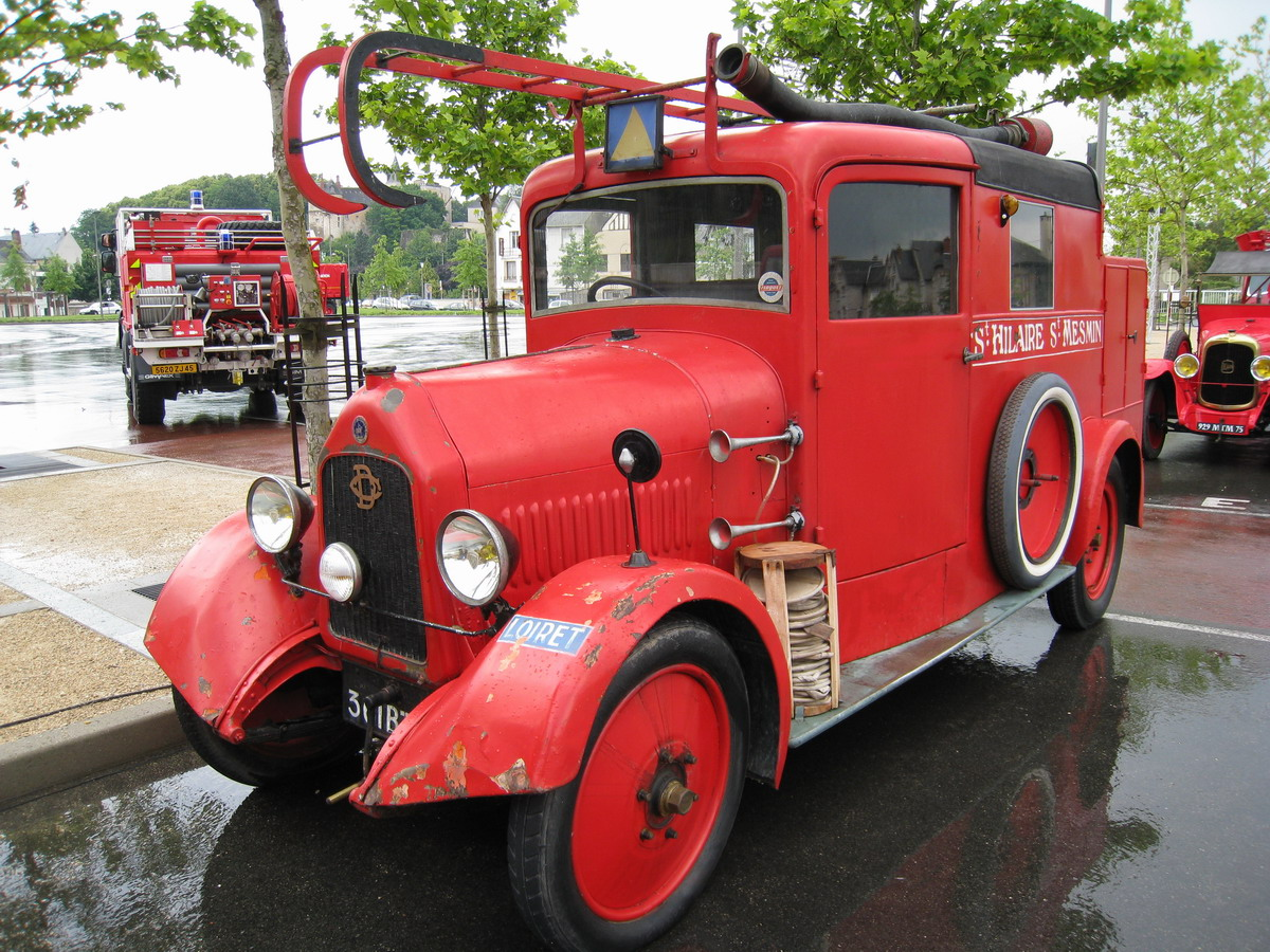 Camion de pompier de la marque Delaugere Clayette